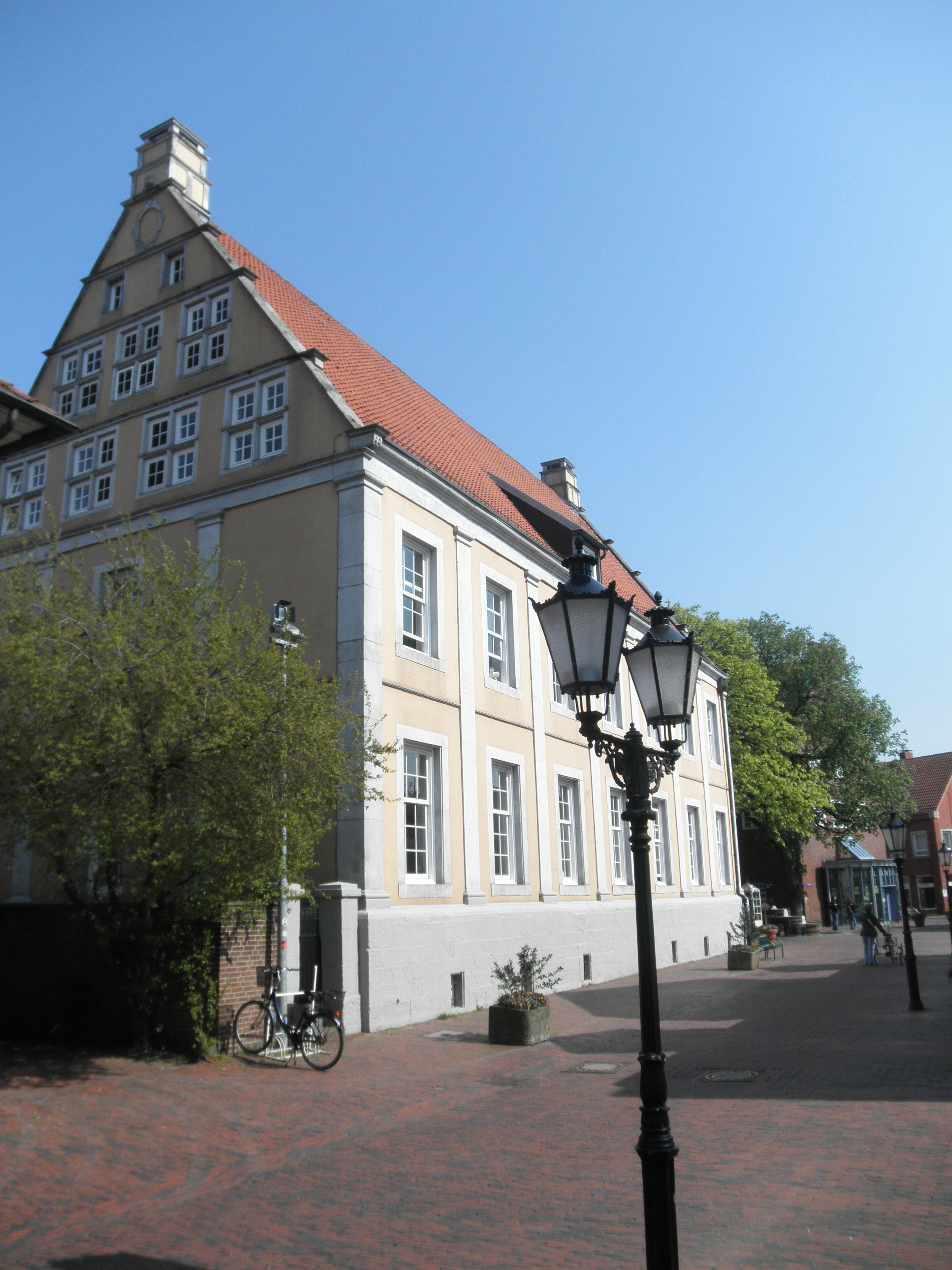 domo "Dankelmannhaus" Burgstraße en Lingen, Germanio